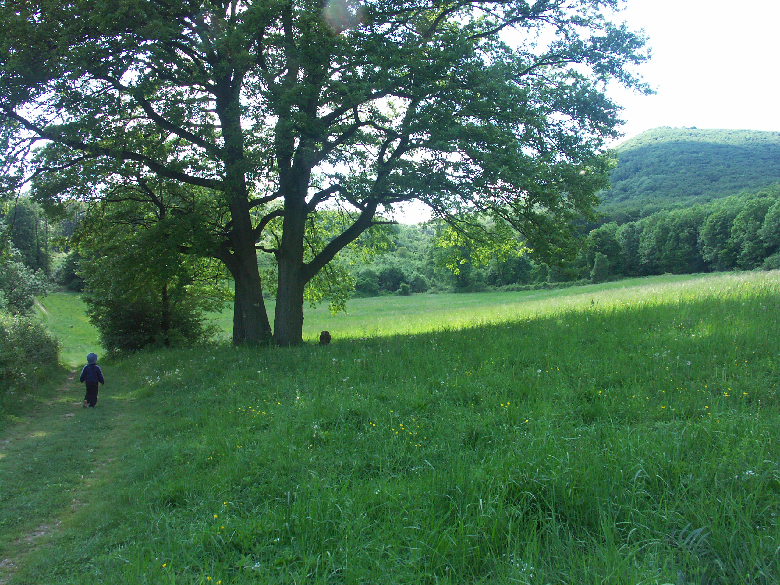 Smolenice,Vlciaren, Slovak Republic